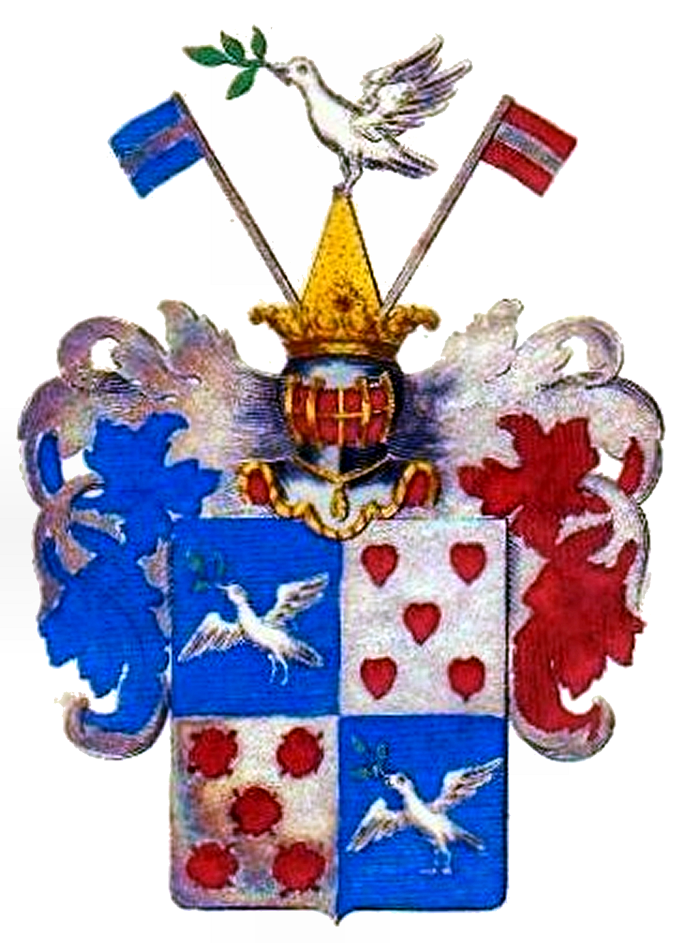 Wappen der von Gülich (1799; Feld 1 und 4: Stammwappen dieses im 16. Jh. in Osnabrück ratsgesessenen Geschlechts)